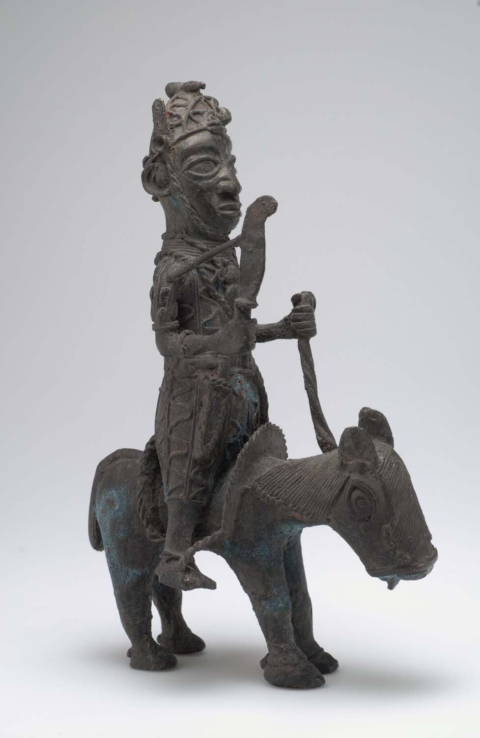 Vermoedelijk afkomstig van een voorouderaltaar.